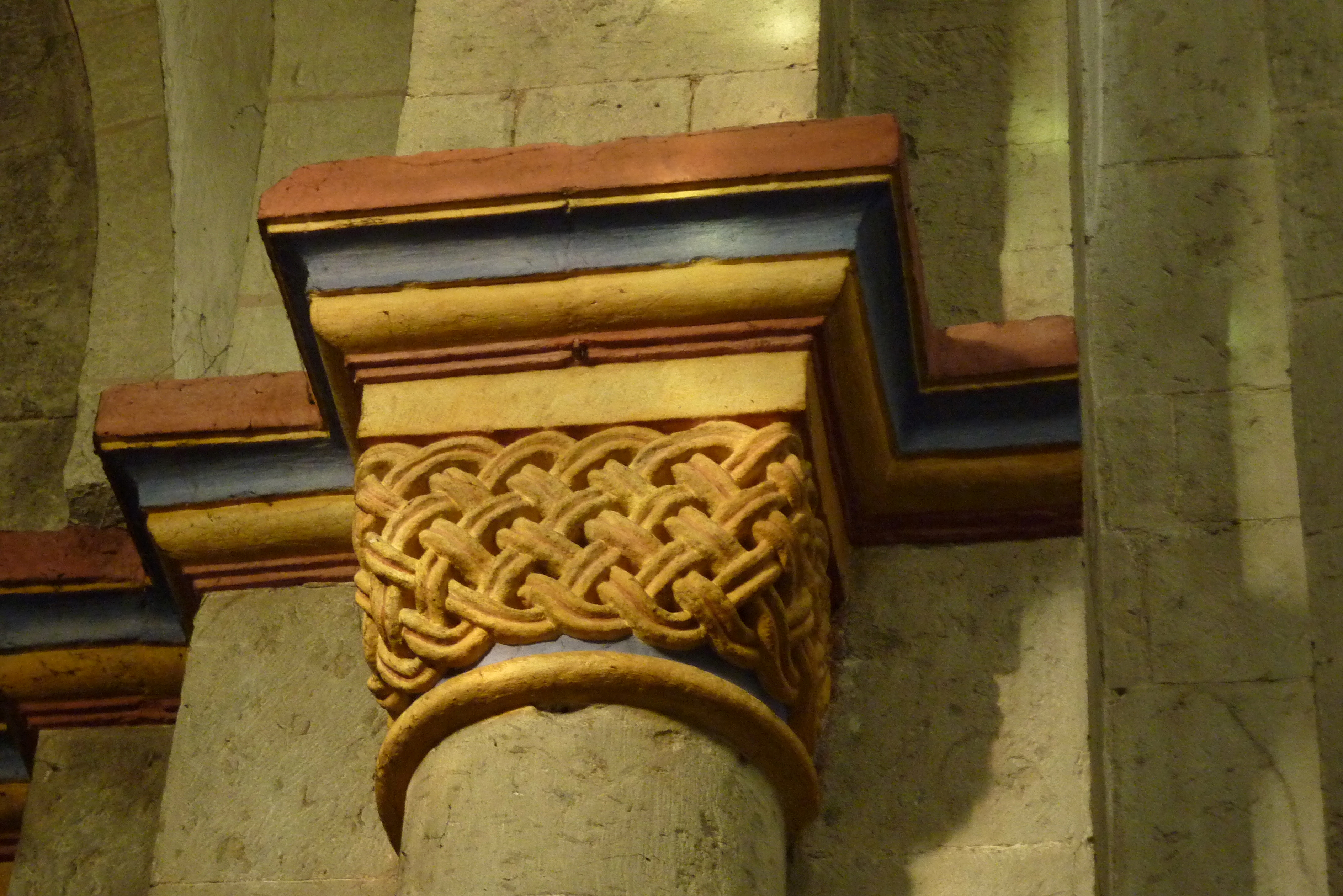 Katholische Kirche St. Maria Magdalena und St. Andreas des ehemaligen Prämonstratenser-Klosters Knechtsteden in Dormagen im Rhein-Kreis Neuss (Nordrhein-Westfalen), Flechtbandkapitell